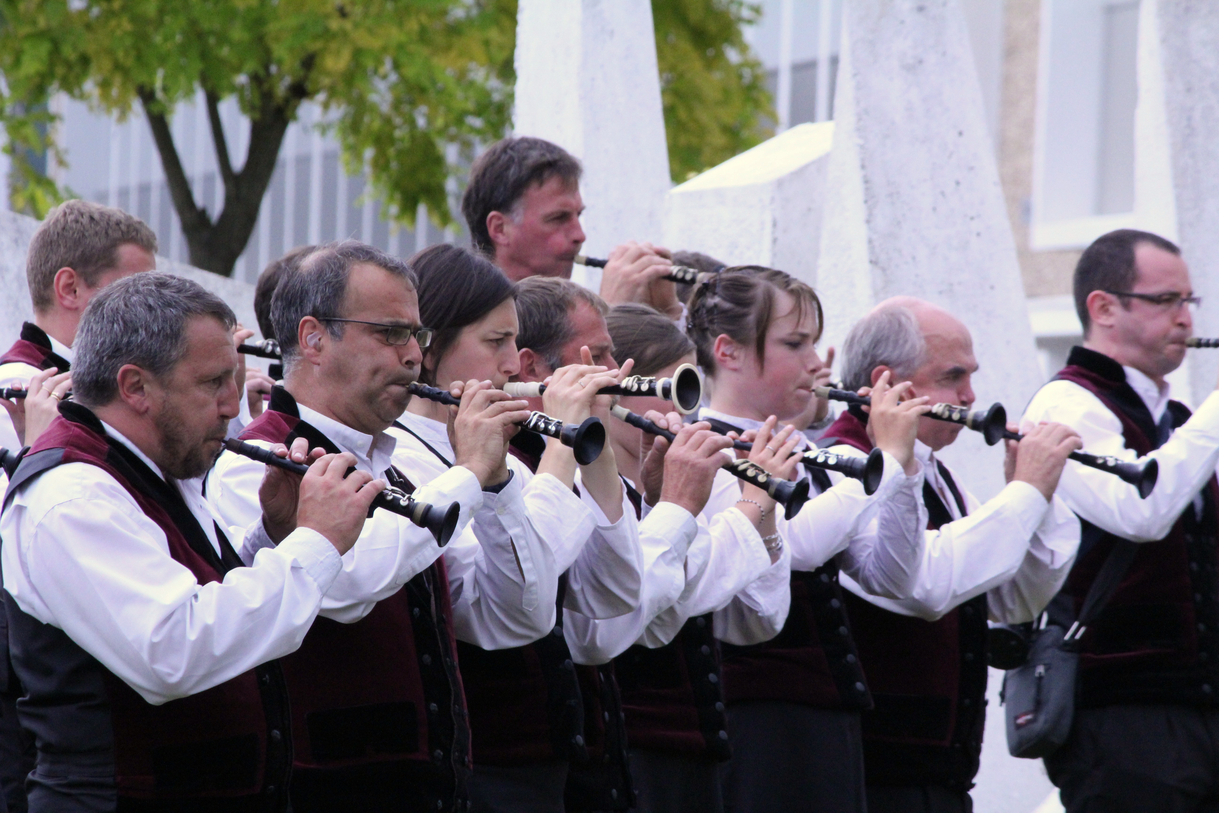 Bagad lors d'une répétition en marge du Festival Interceltique Lorient 2011